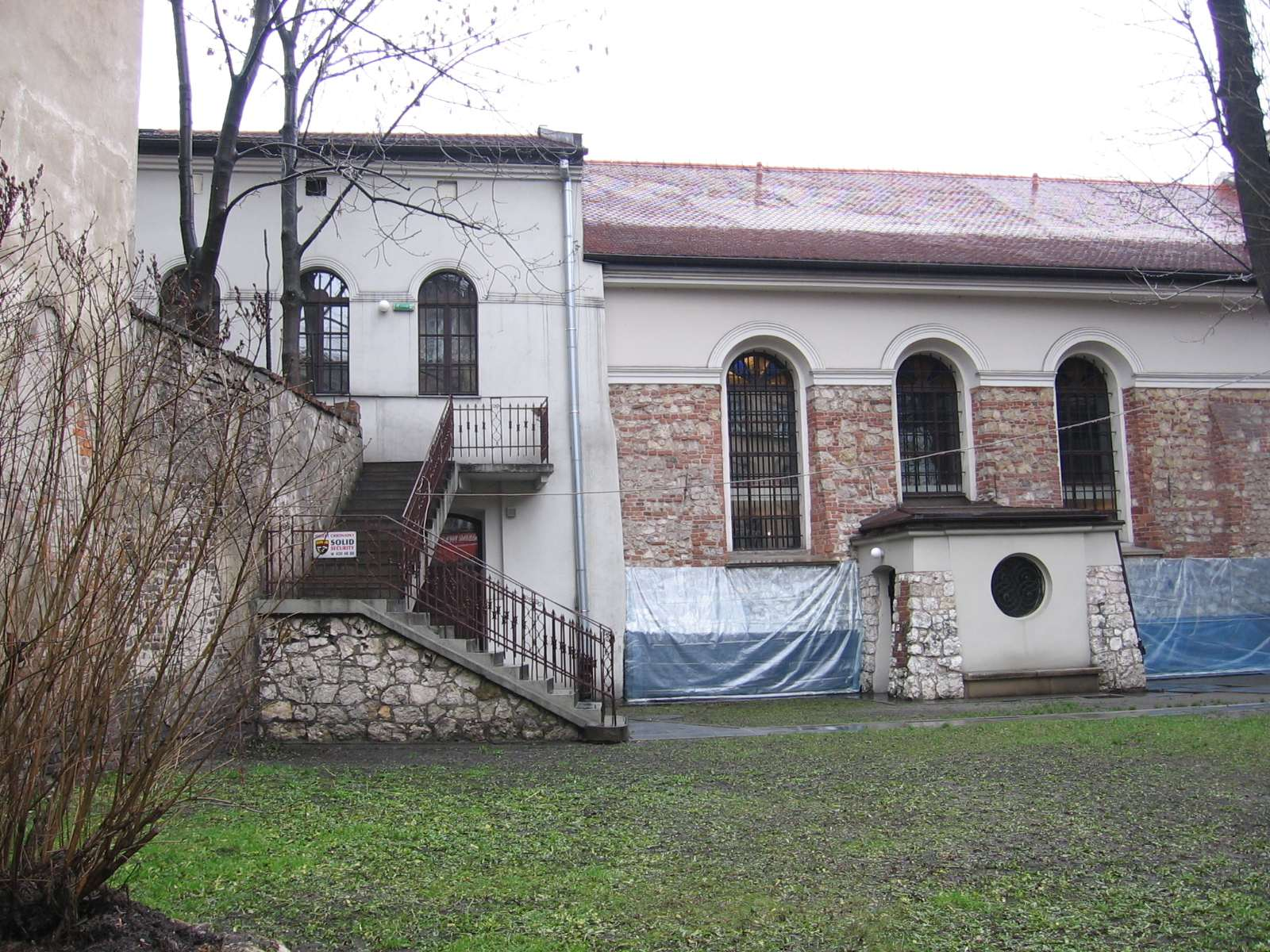 Synagoga Kupa w Krakowie Author: Wikipedysta:Birczanin